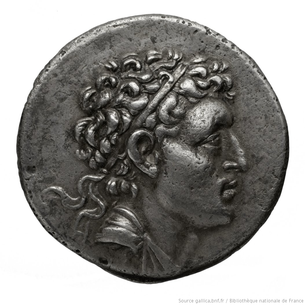 Description matérielle : 1 monnaie ; 16,62 g ; flan circulaire Matière et technique de production : Argent, frappe